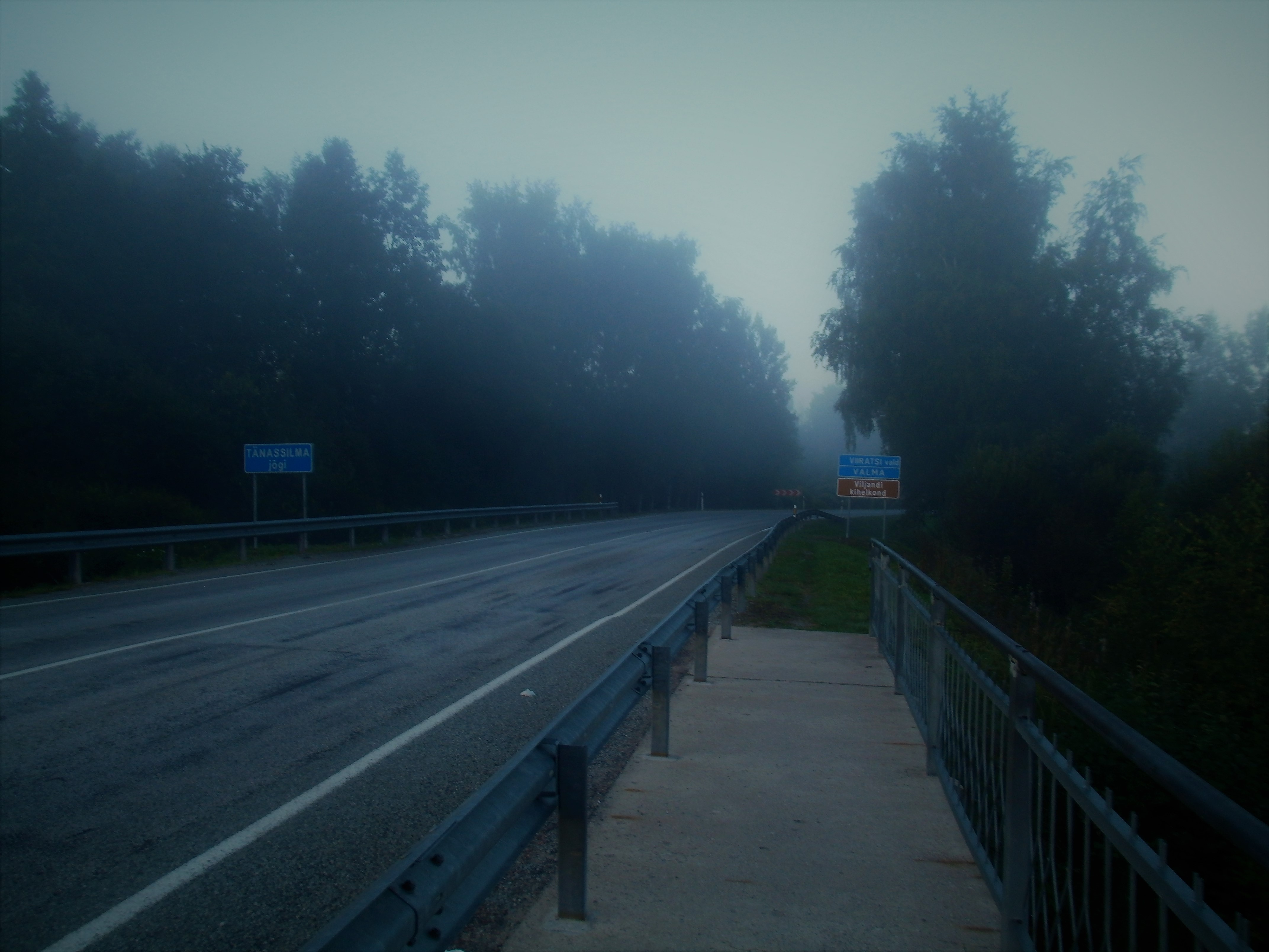 Viljandi-Tartu maantee sild Tänassilma jõel Oius.